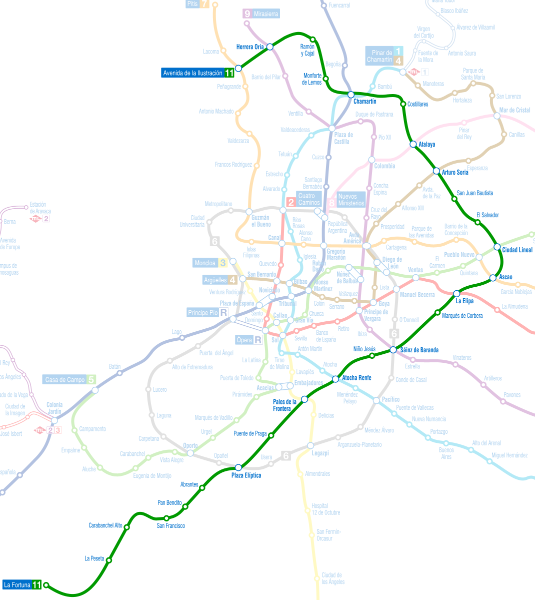 Futura línea 11 del Metro de Madrid